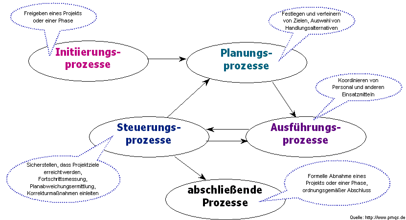 Darstellung der Prozessgruppen im Projektmanagement.